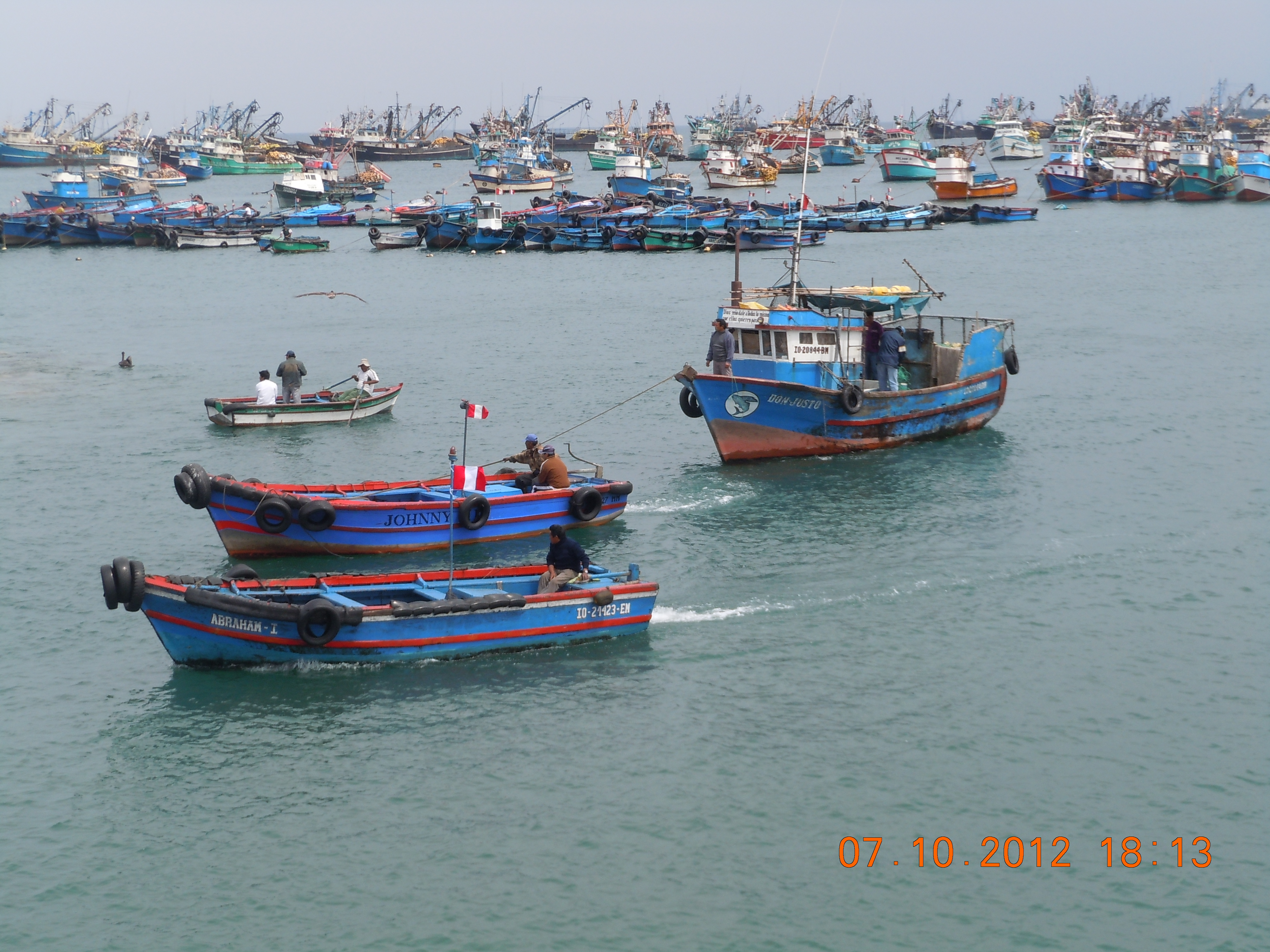 ILO PERU' balıkçılar